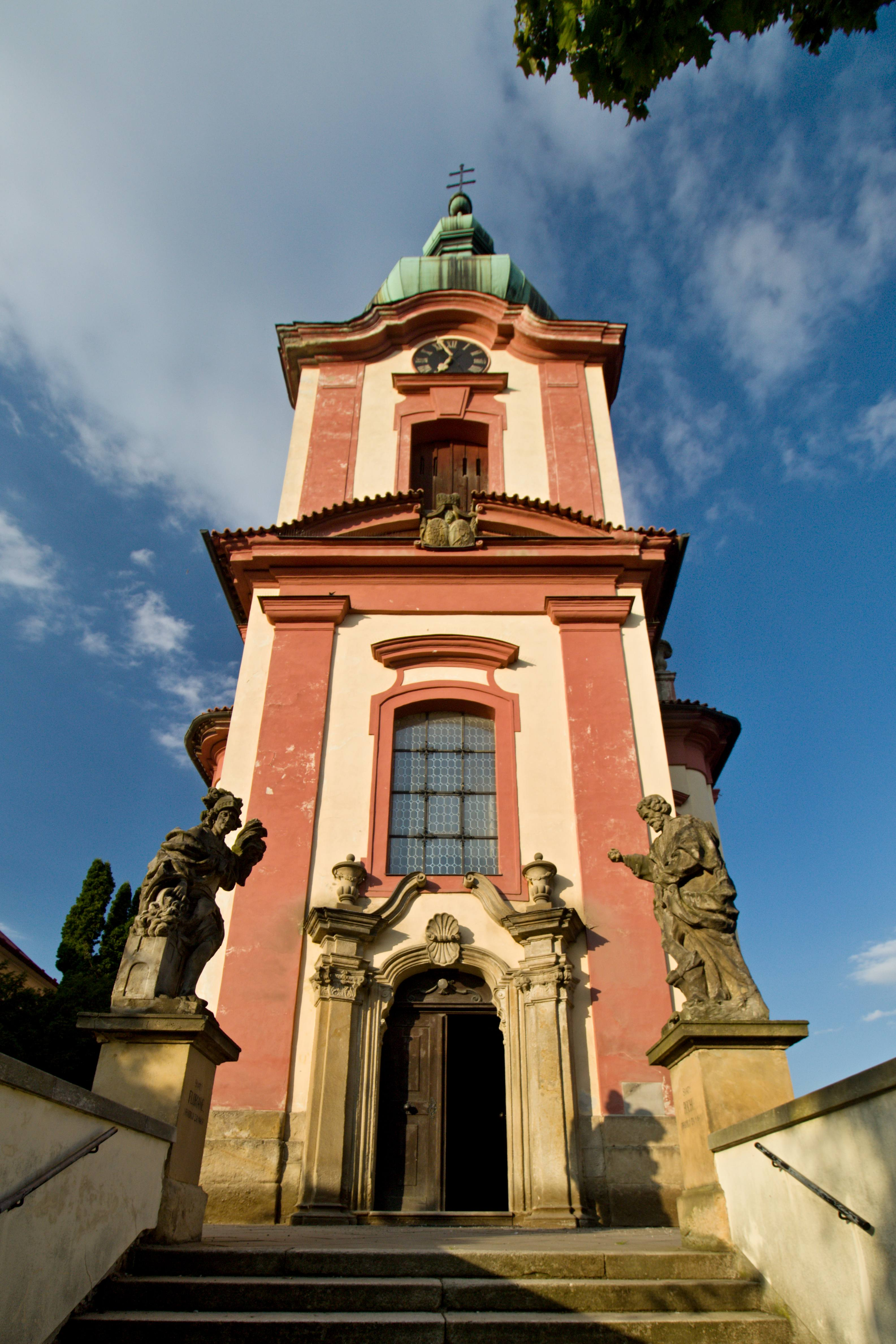 Praha-Uhříněves, barokní kostel Všech svatých